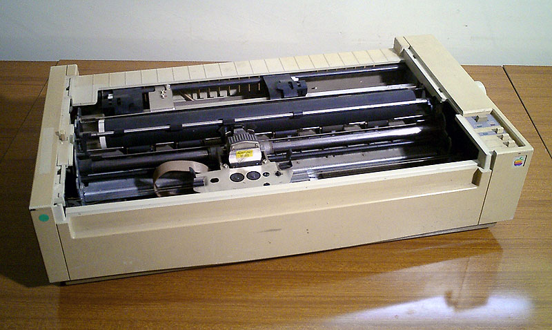 Interno di una Apple Imagewriter